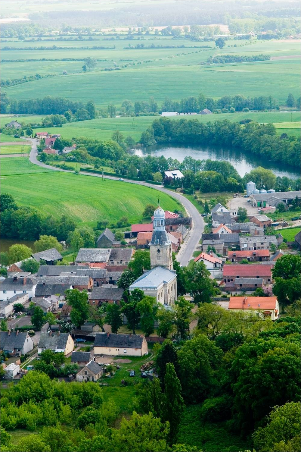 Lutom z lotu ptaka